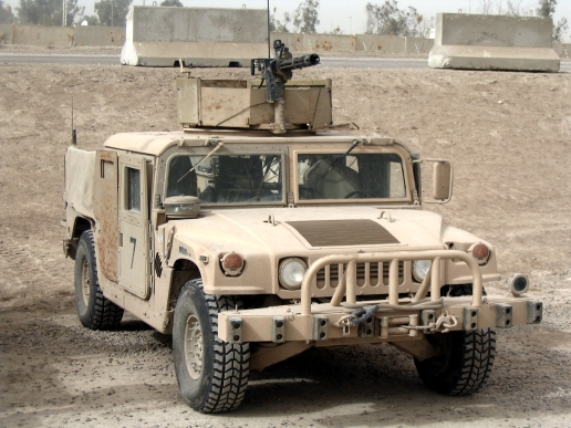 minigun on Humvee